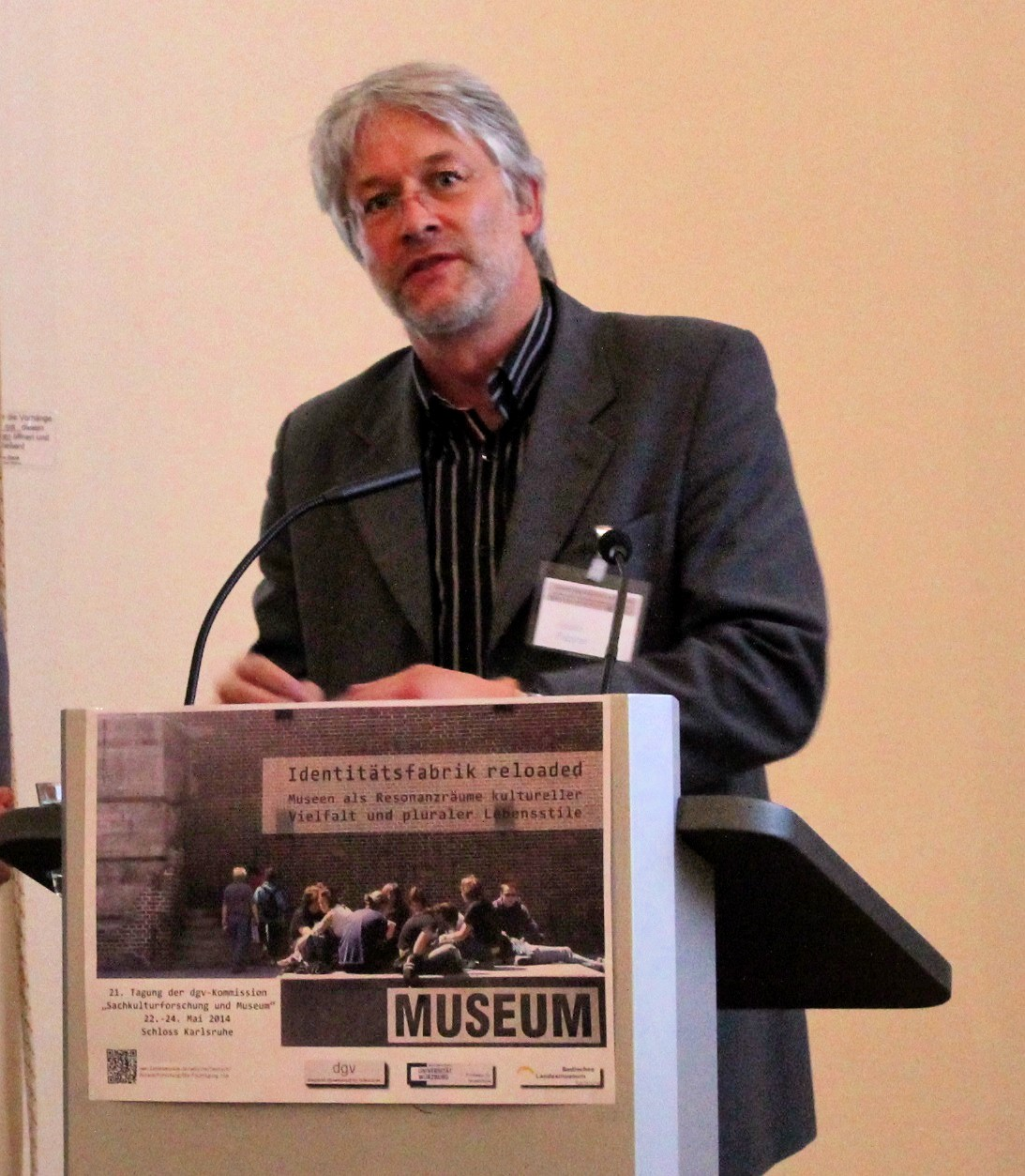 Guido Fackler bei der Tagung "Identitätsfabrik reloaded?! Museen als Resonanzräume kultureller Vielfalt und pluraler Lebensstile" im Badischen Landesmuseum in Karlsruhe, 23. Mai 2014